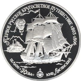 Первое русское кругосветное плавание: Шлюп «Нева» — Ю.Ф.Лисянский